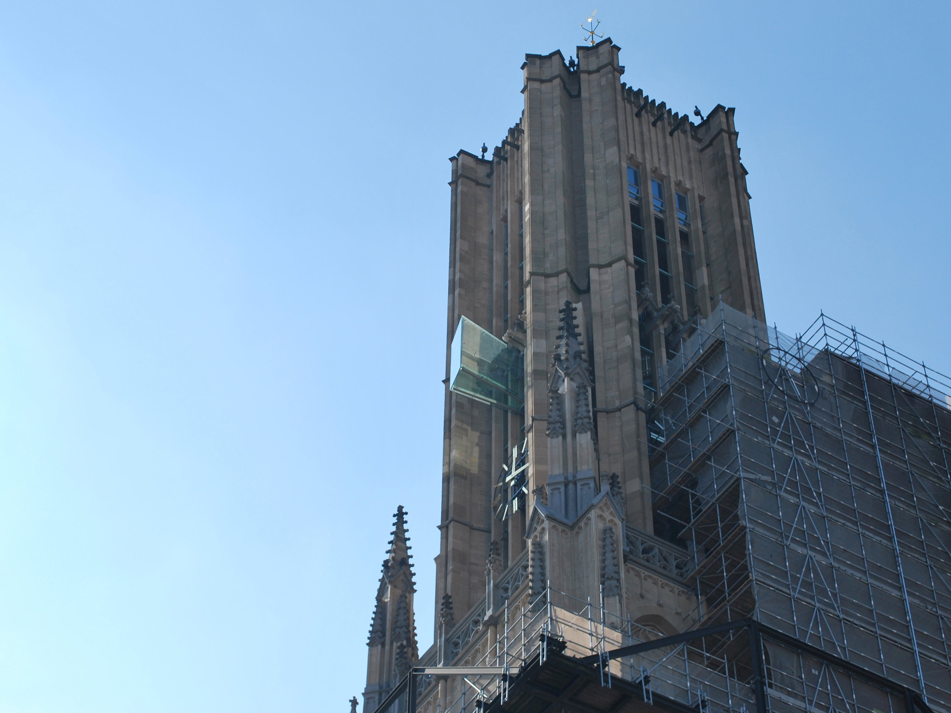 Glazen balkons aan Eusebiuskerk Arnhem, Nederland